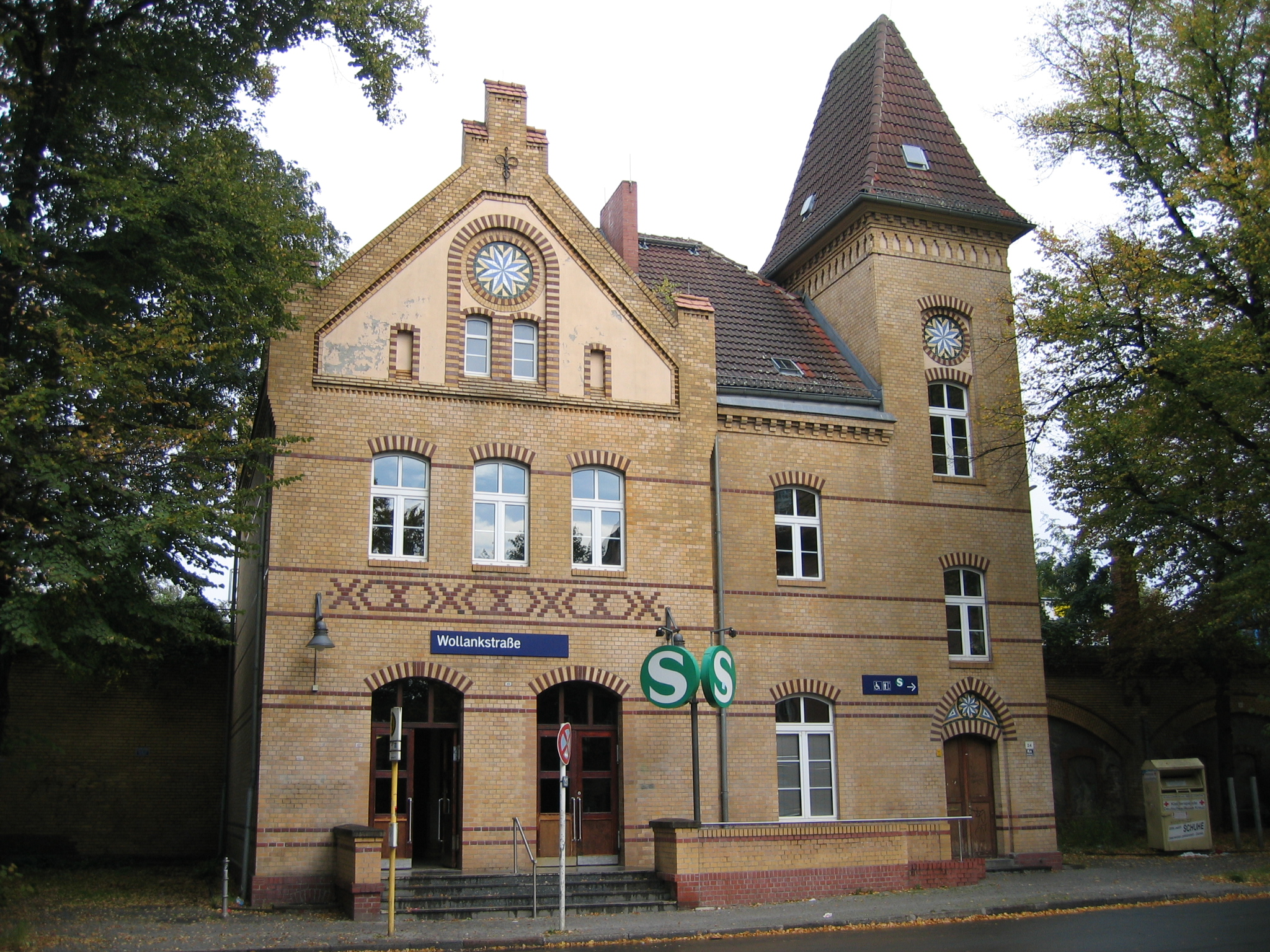 S-Bahnhof Berlin Wollankstraße, Empfangsgebäude